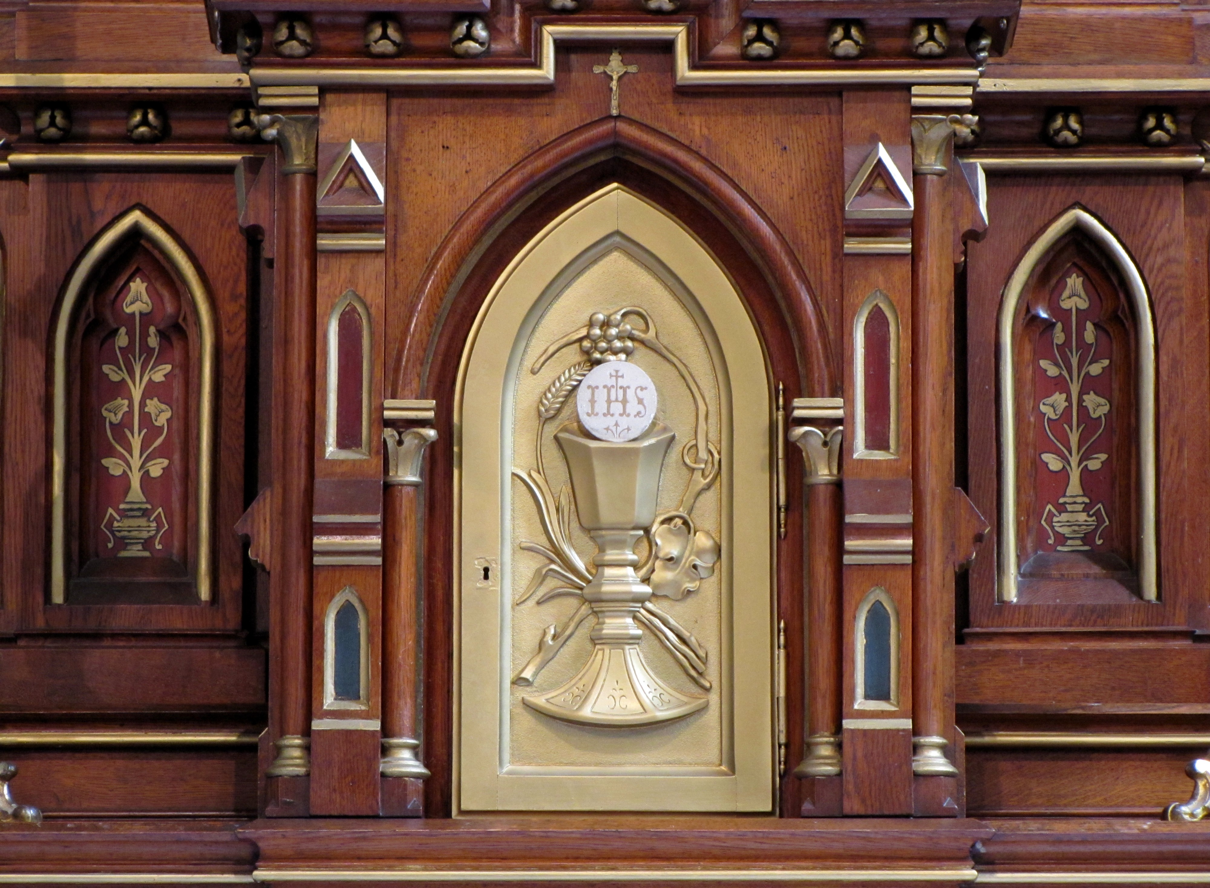 Alsace, Bas-Rhin, Wiwersheim, Église Saint-Cyriaque (IA67001024). Tabernacle du maître-autel de Théophile Klem (XIXe)